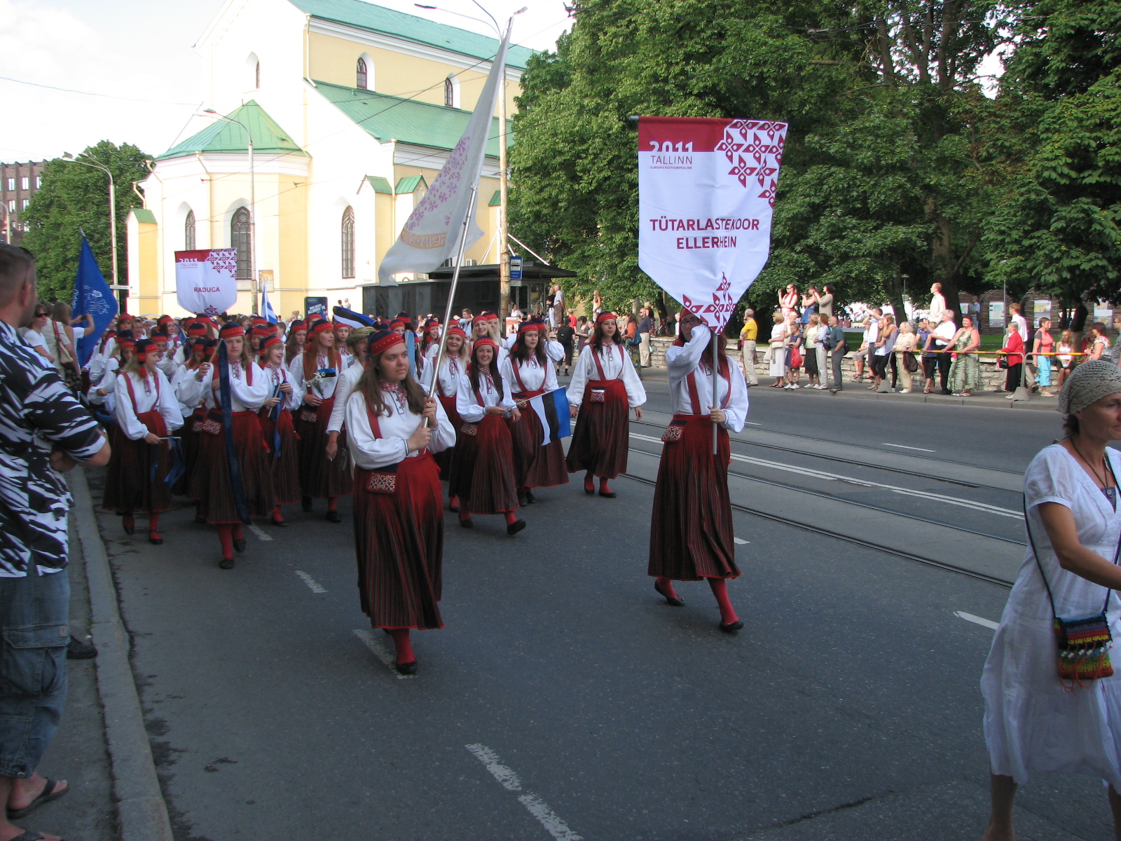 Tütarlastekoor Ellerhein XI noorte laulu- ja tantsupeo rongkäigus